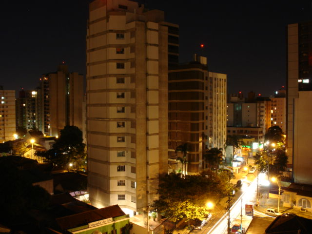 Rua Cel. Quirino